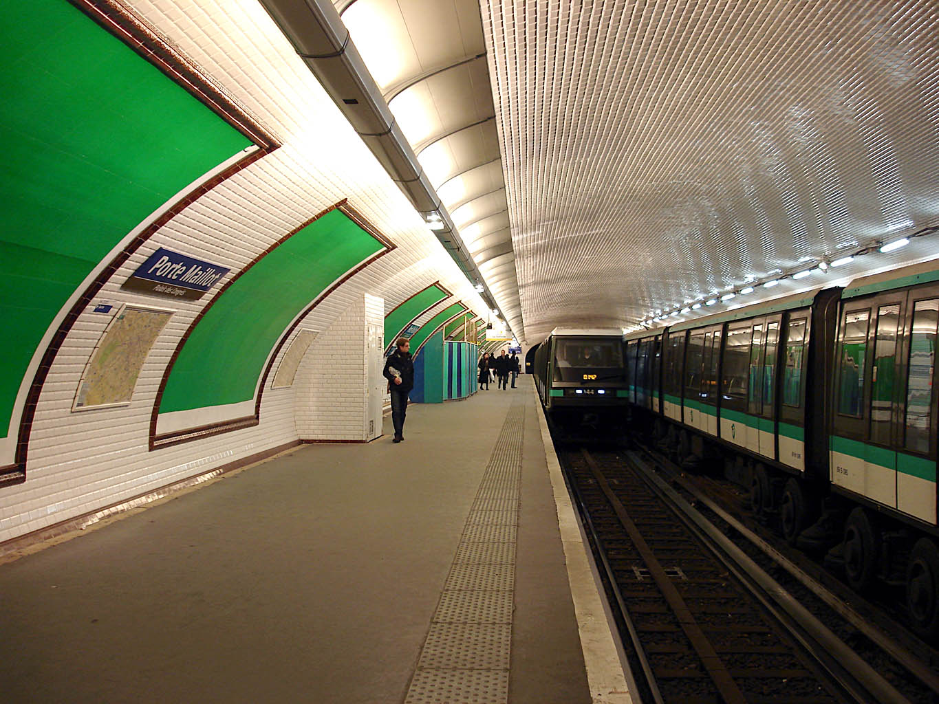 Station Porte Maillot de la ligne 1 du métro de Paris, France.